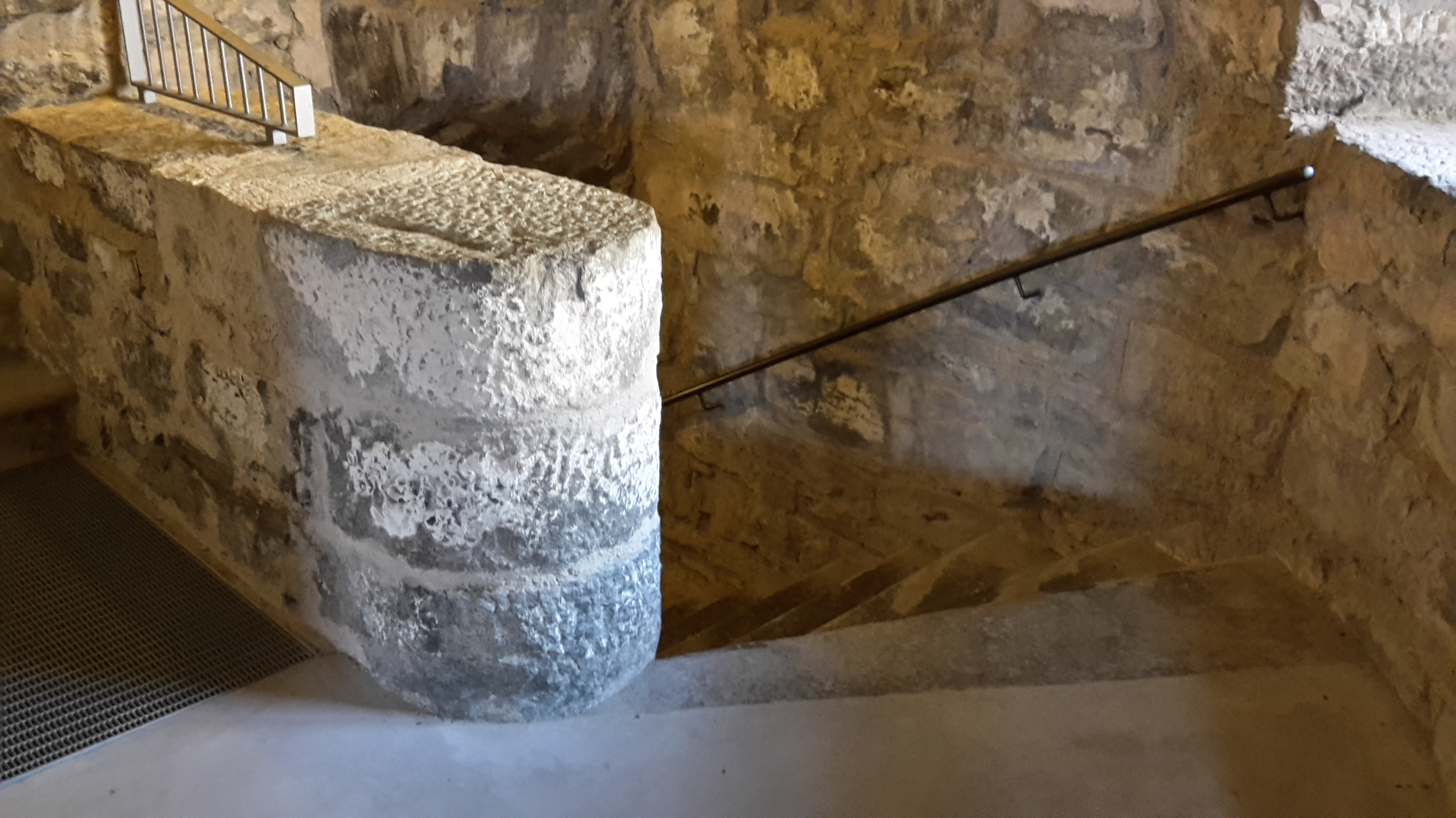 Forte Col de le Bene